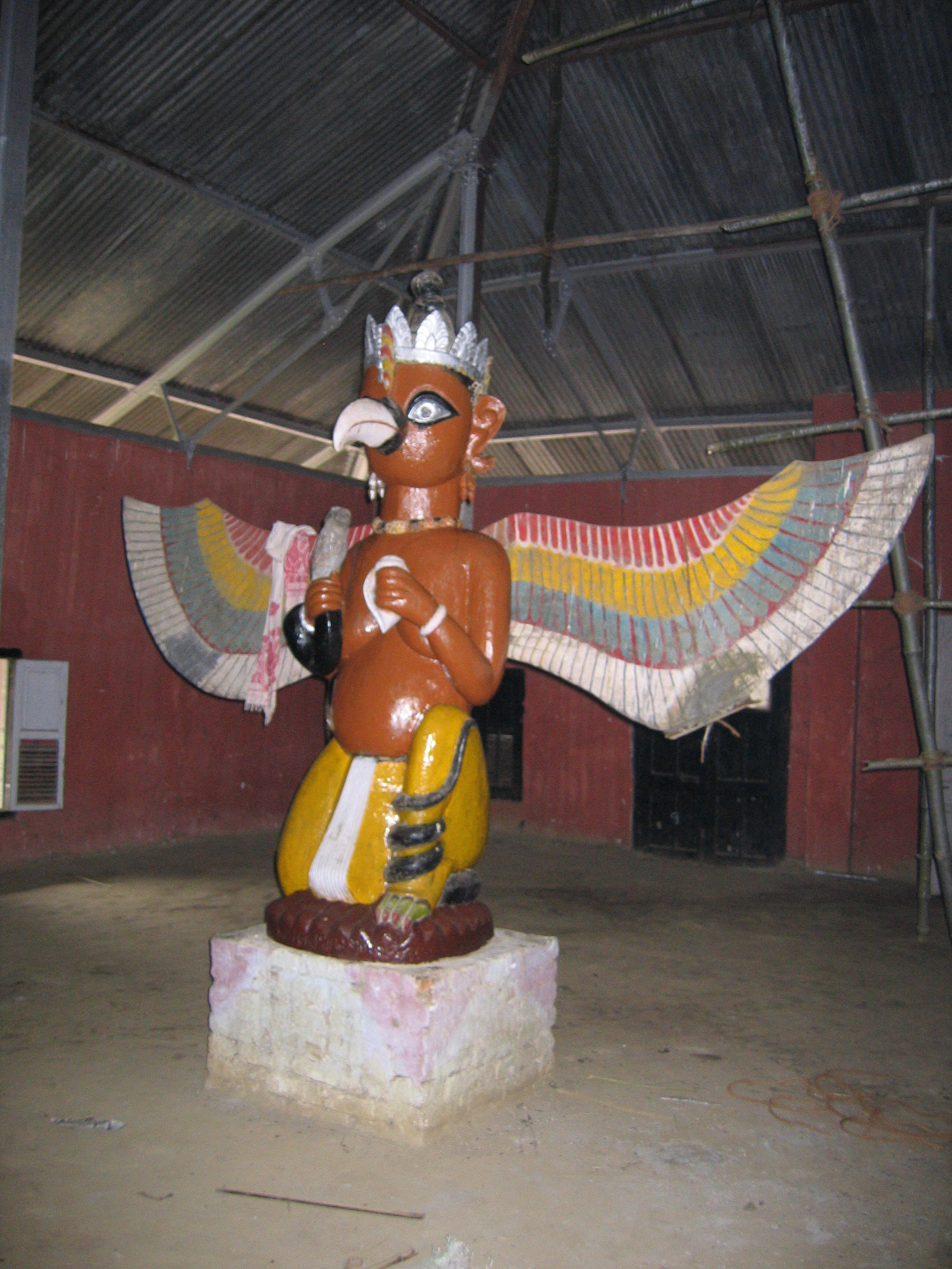 From a Satra on Majuli